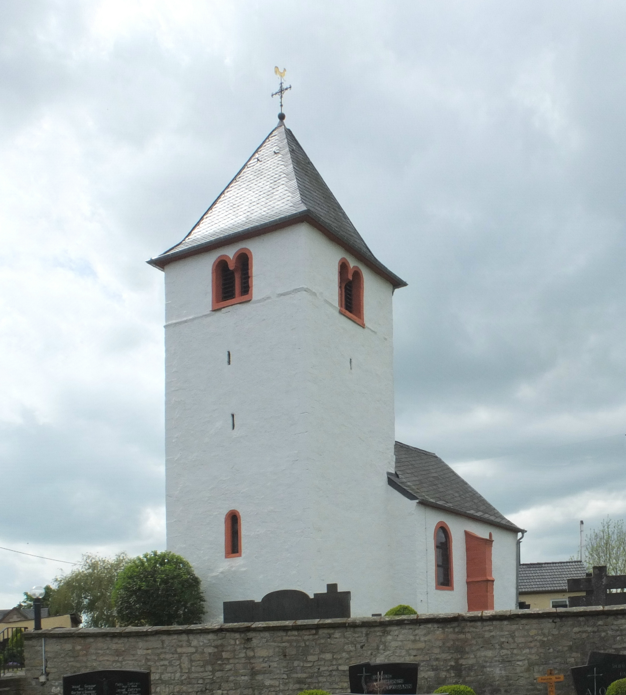 Sankt Hubertus in Stockem (Eifelkreis Bitburg-Prüm) This is a photograph of an architectural monument.It is on the list of cultural monuments of Stockem